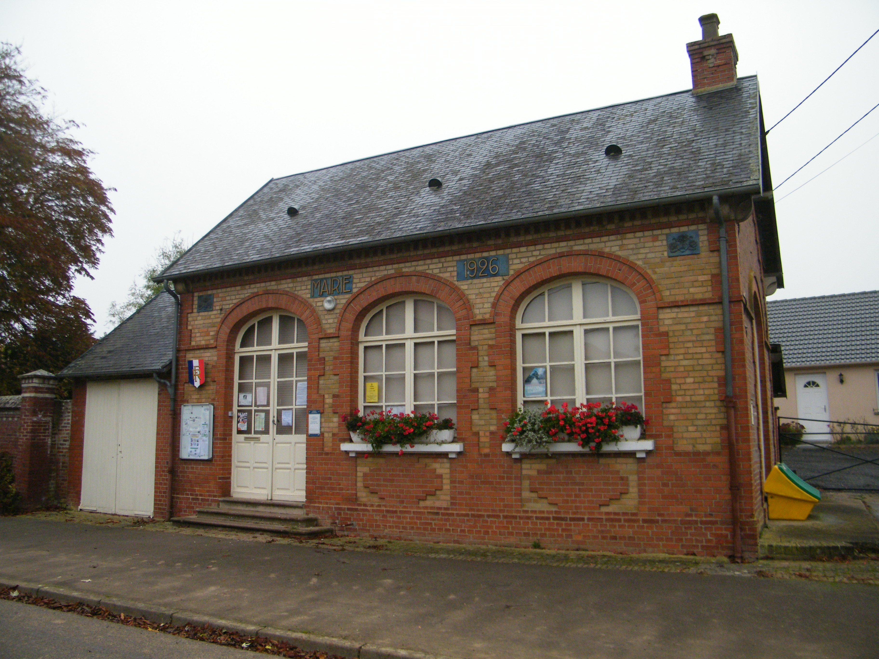 Bâtiments communaux.